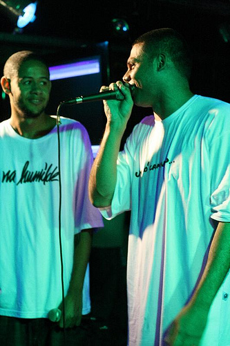 Festa Quilombo Hip Hop reuniu Emicida e Marechal no mesmo palco. Os MCs atenderam pedidos do público, que apareciam nas telas instaladas no palco, e faziam freestyle com os temas sugeridos. A festa lotou o Hole Club, na Rua Augusta (Jardins, SP), em uma noite de muito calor no dia 14 de novembro. FOTO: JANAÍNA CASTELO BRANCO/siteNOIZ